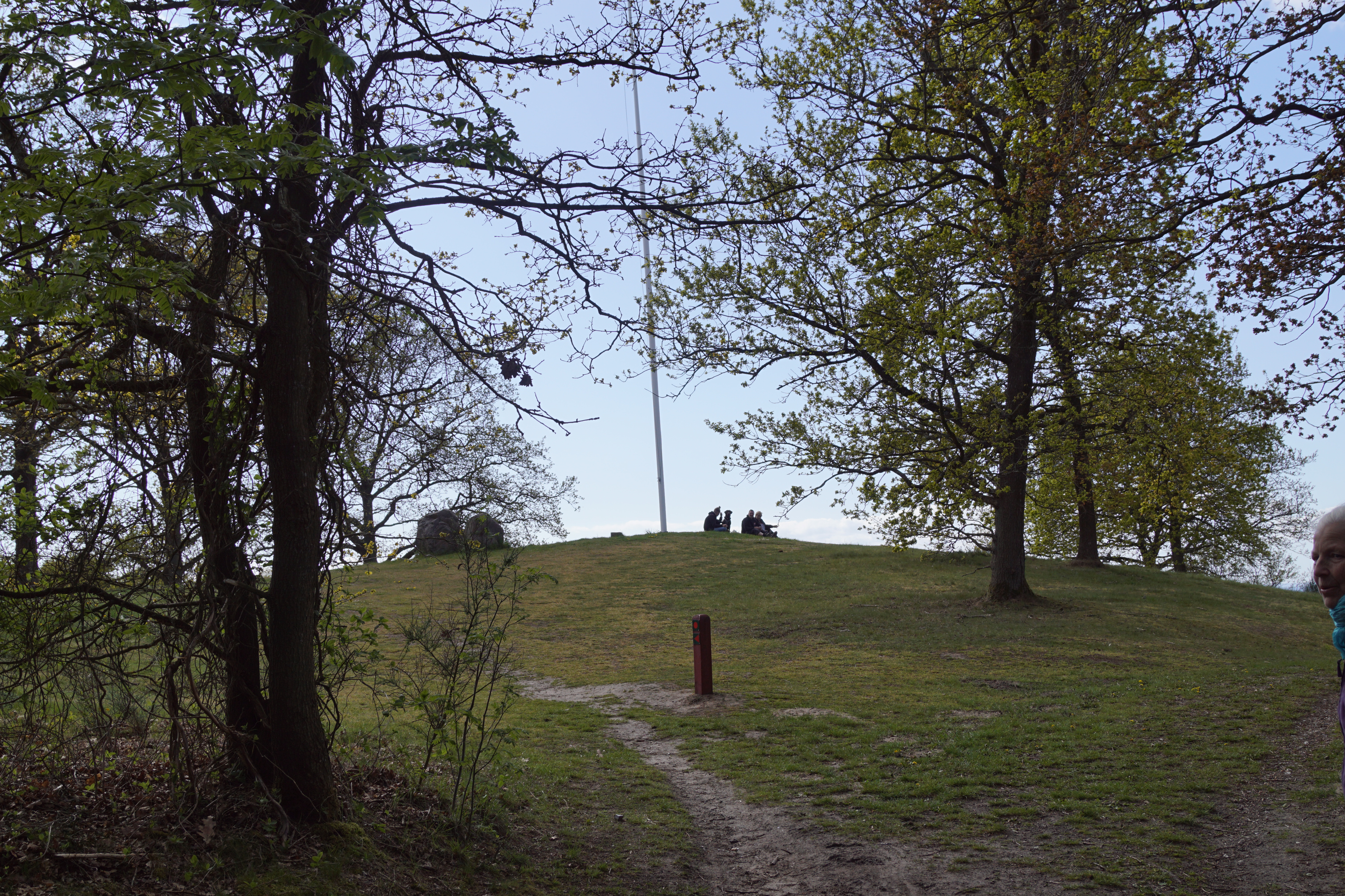 Svanninge Bakker ved Faaborg, ved talestolen